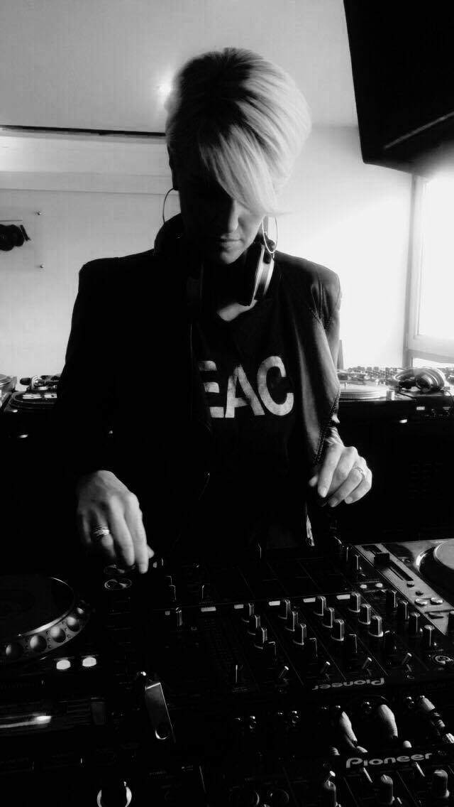 Lisa Crawford - DJ - en répétition privée - 2017